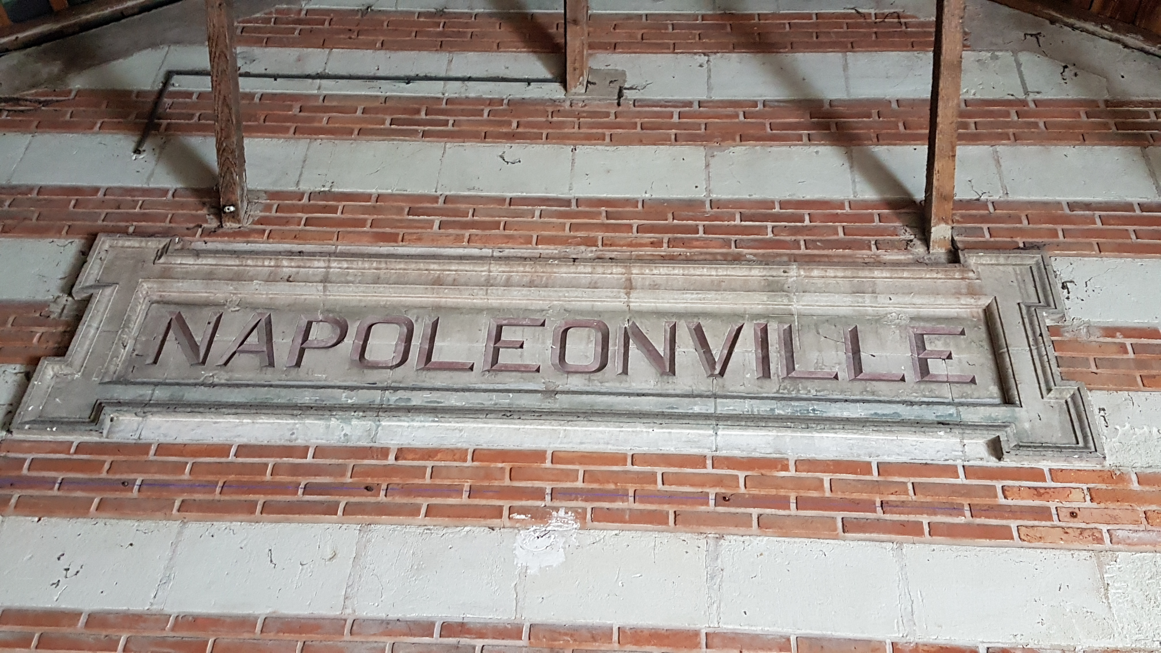 nom de la gare de Pontivy sous Napoléon III